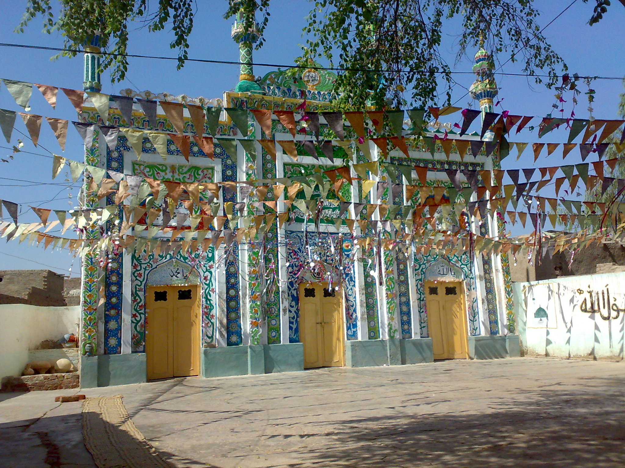 Dadu Tehsil, Pakistan